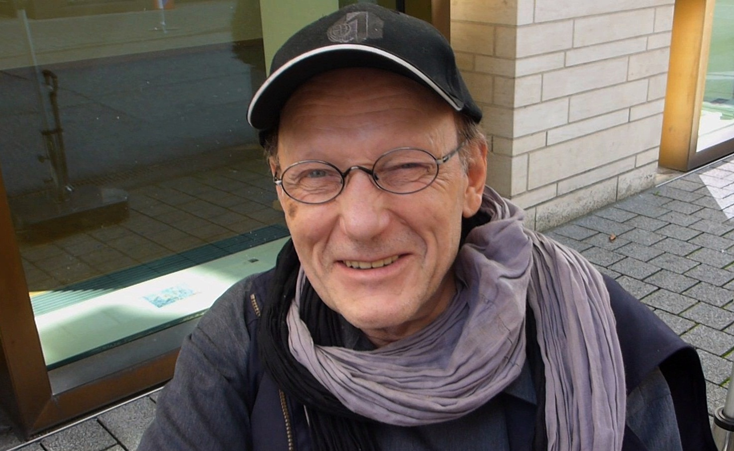 Uwe Lindau, Bildender Künstler vor der Galerie Schrade in Karlsruhe anlässlich seiner Austellung 2014.